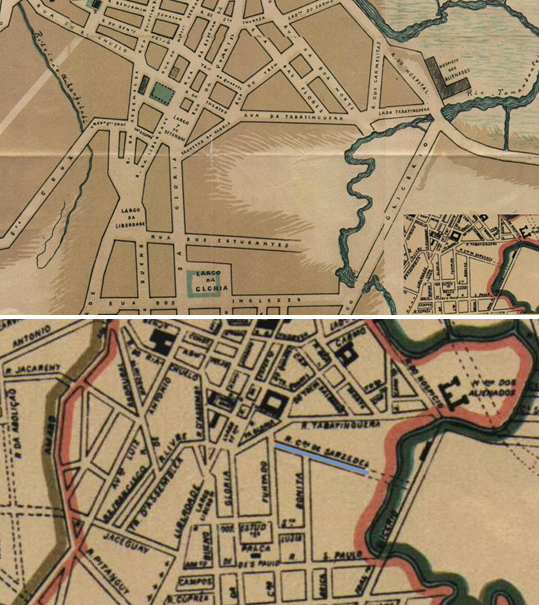 Comparação de dois detalhes de mapas históricos no Domíno Público.